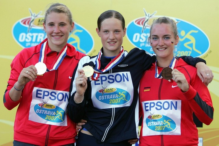 česká atletka Kateřina Cachová